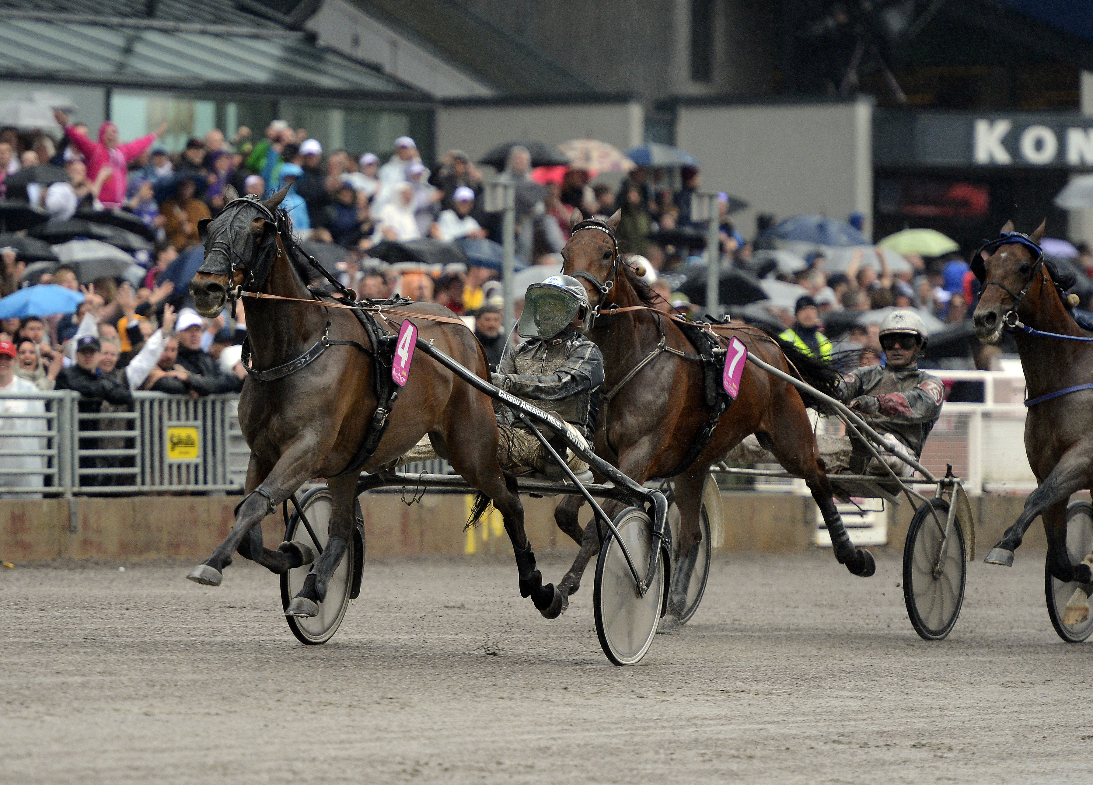 Kusken Robert Bergh och travaren Nahar (4) vinner Elitloppet 2013 på Solvalla.